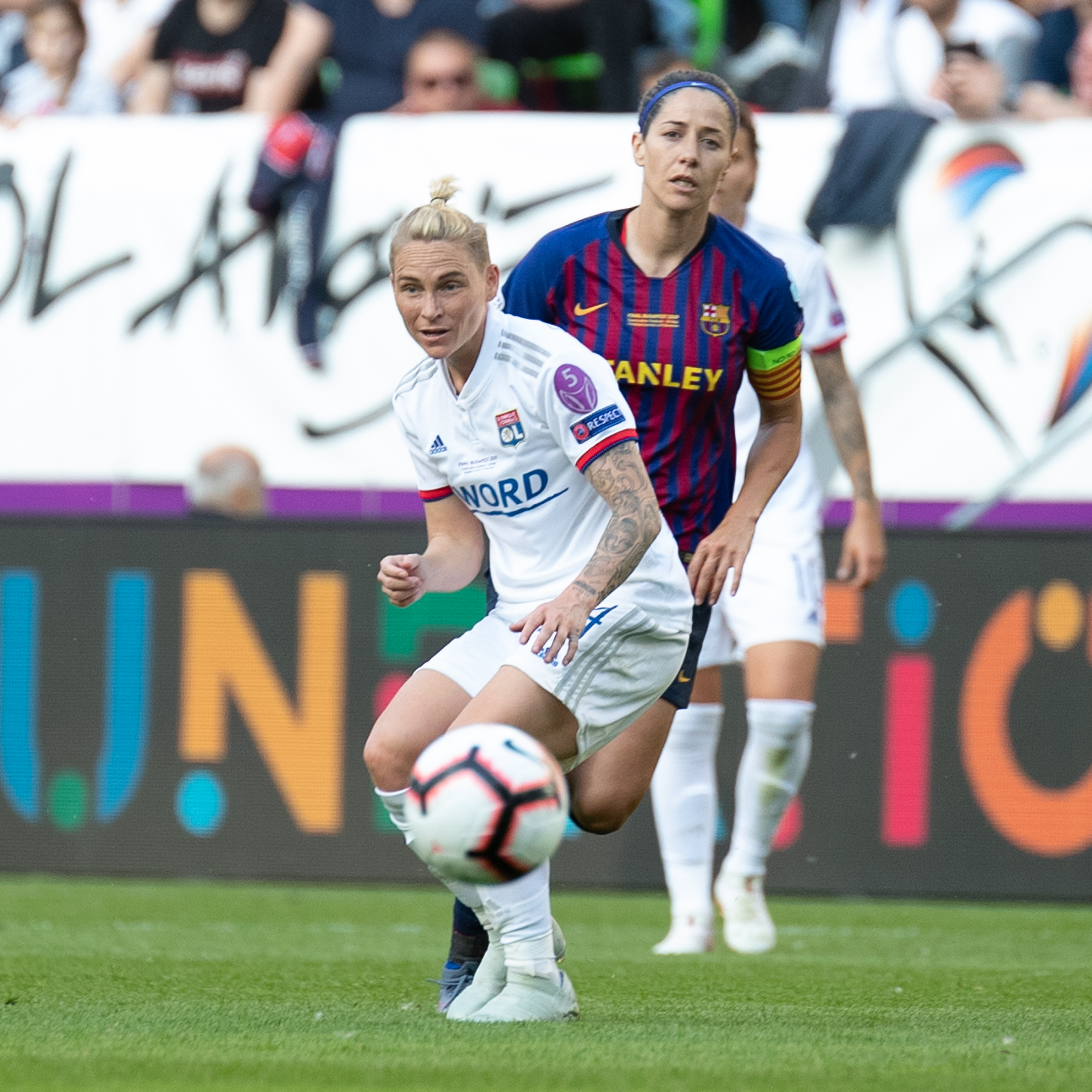 Fußball, Frauen, UEFA Women's Champions League, Olympique Lyonnais - FC Barcelona; Jessica Fishlock (Olympique Lyon, 24), dahinter Vicky Losada (FC Barcelona, 6)